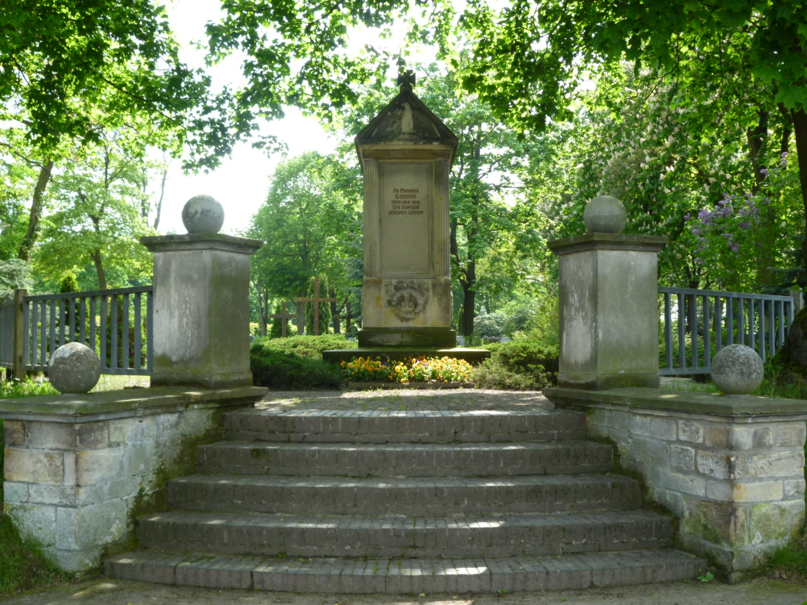 Denkmal für die Gefallenen des Ersten Weltkriegs